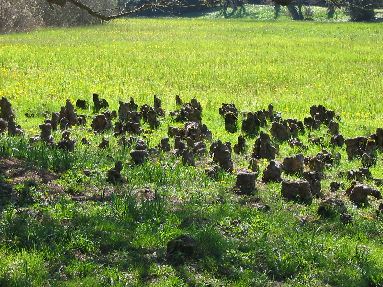 Cypryśnik błotny (Taxodium distichum) - pneumatofory. Zdjęcie wykonane dnia 14 kwietnia 2007 w Arboretum w Kórniku. Taxodium distichum - pneumatophores. Photo was taken 14th April 2007 in Arboretum in Kórnik (Poland). Autor: Piotrm00